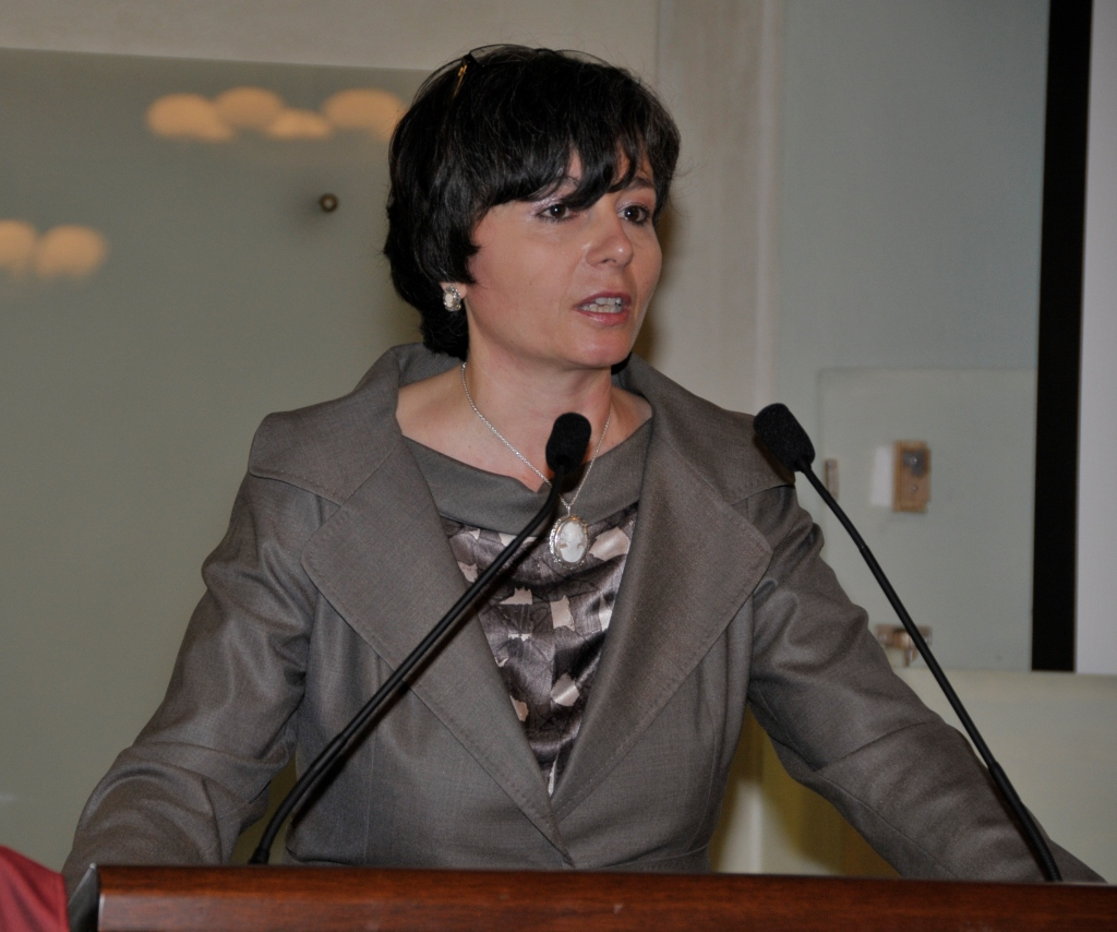 Maria Chiara Carrozza, ex direttrice del Sant'Anna e Ministro dell'Istruzione Università e Ricerca nel governo Letta